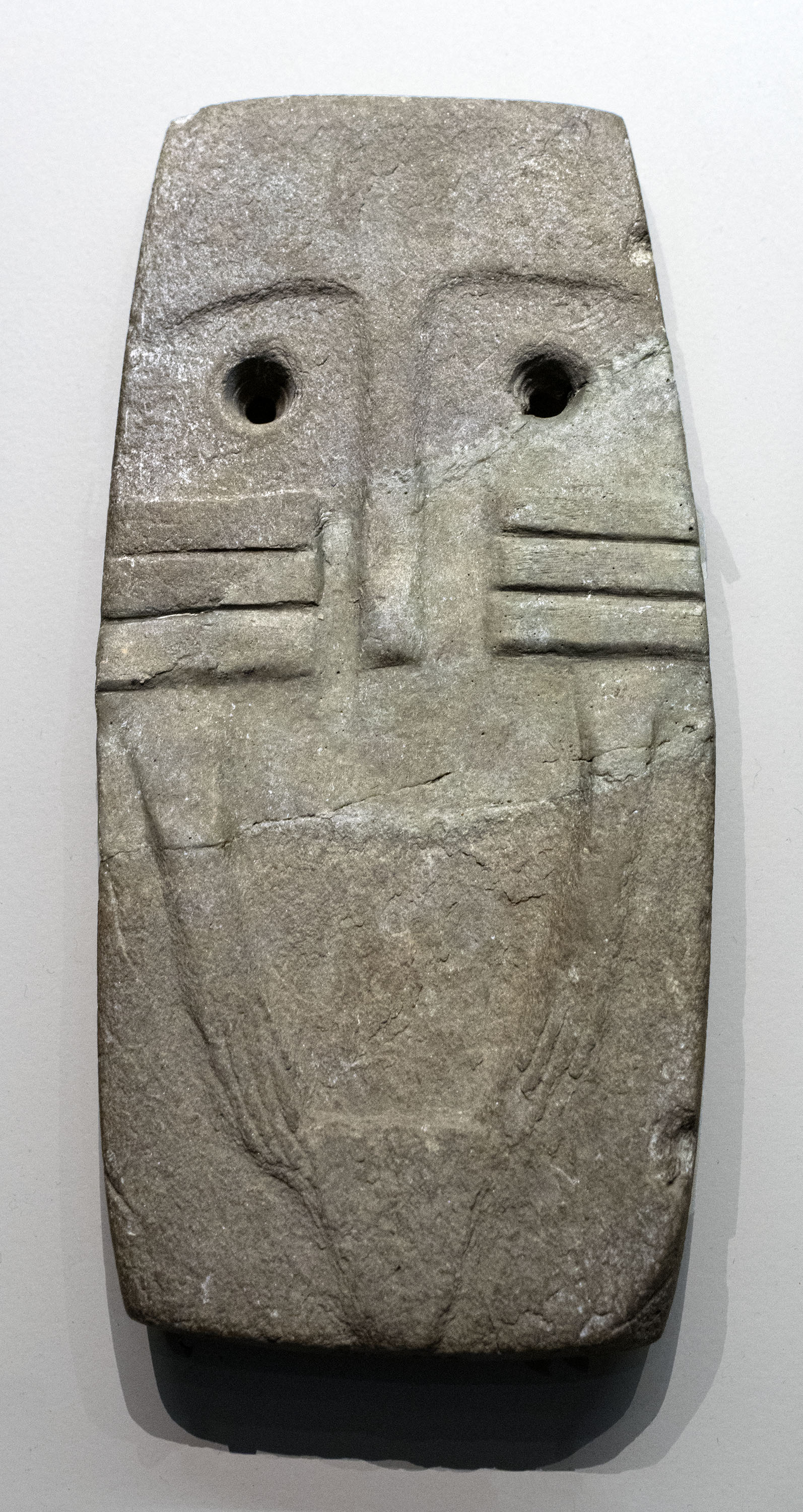 Procede del Dolmen de Garrovillas en Vega de Guadancil, Cáceres. Mide unos 16 x 8 cm y está datado hacia el 3750 a.C. A este tipo de piezas, grabadas sobre esquistos y propias del SE de la Península Iberica, se le suele llamar "ídolos placa". Ingresó en el MAN en 1868. La parte central, que difiere ligeramente en color, está reconstruida (ver foto original en el MAN, con número de inventario FD/P/03339).